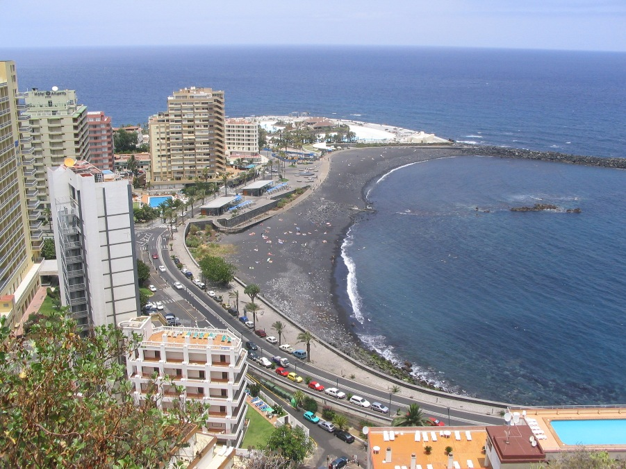 Playa de Martiánez, Puerto de la Cruz, isla de Tenerife, Canarias, España.